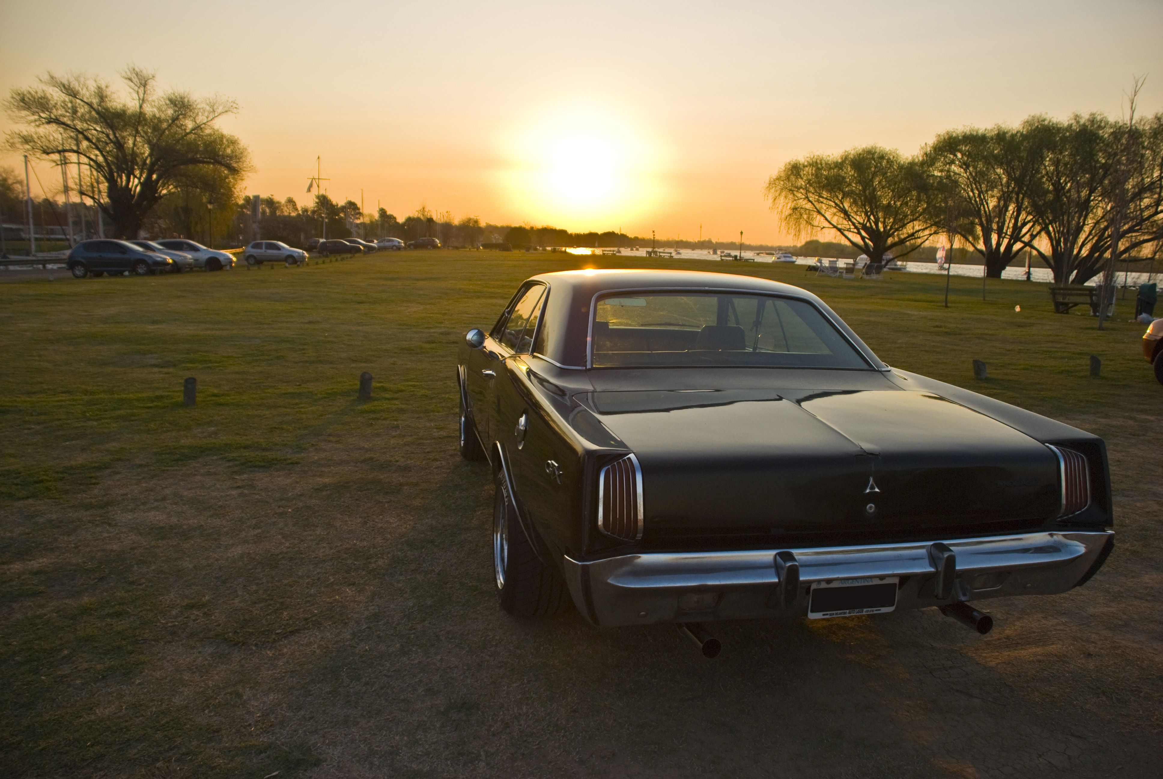 cola